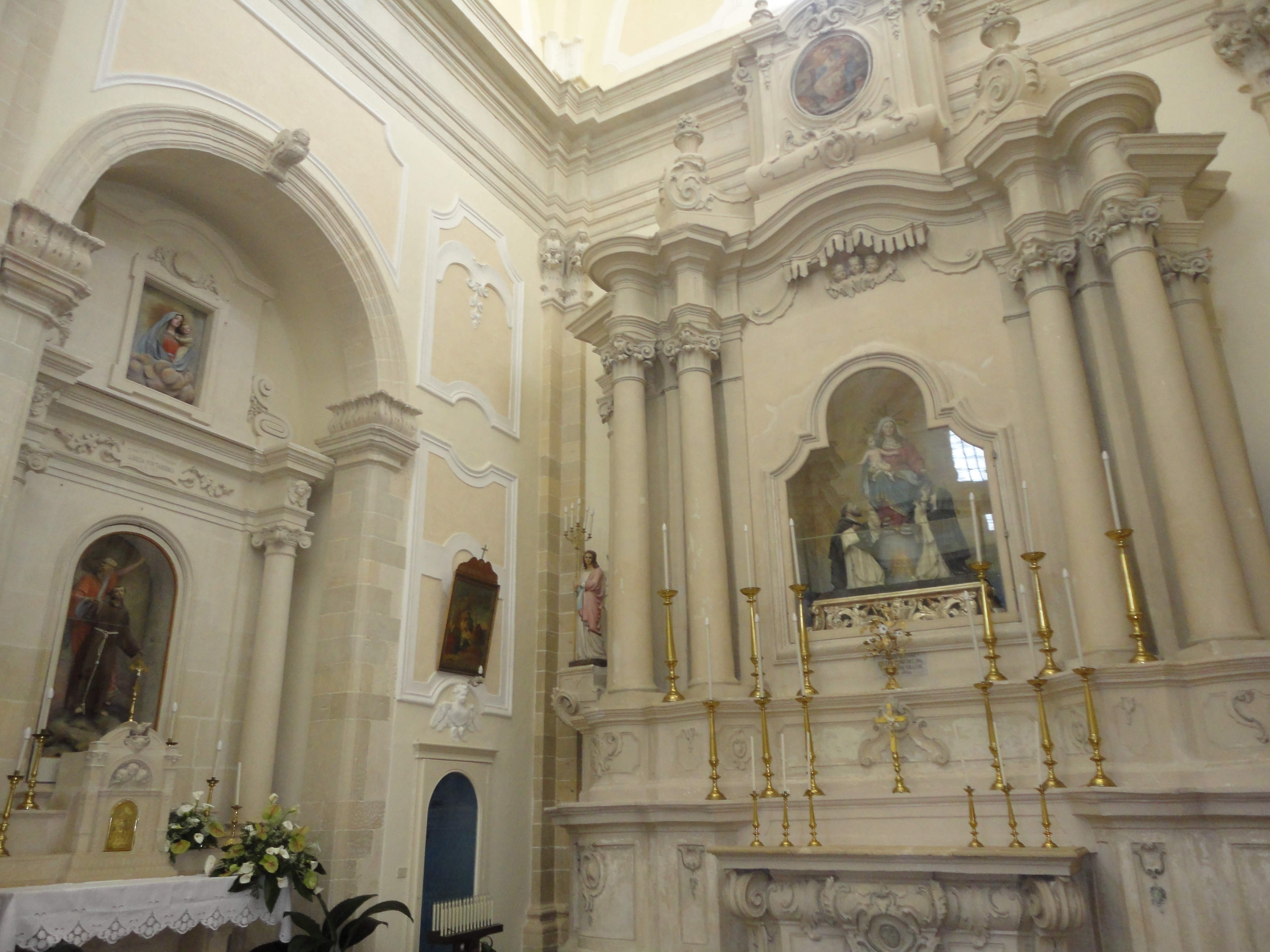 Uggiano la Chiesa transetto sinistro Chiesa Madre